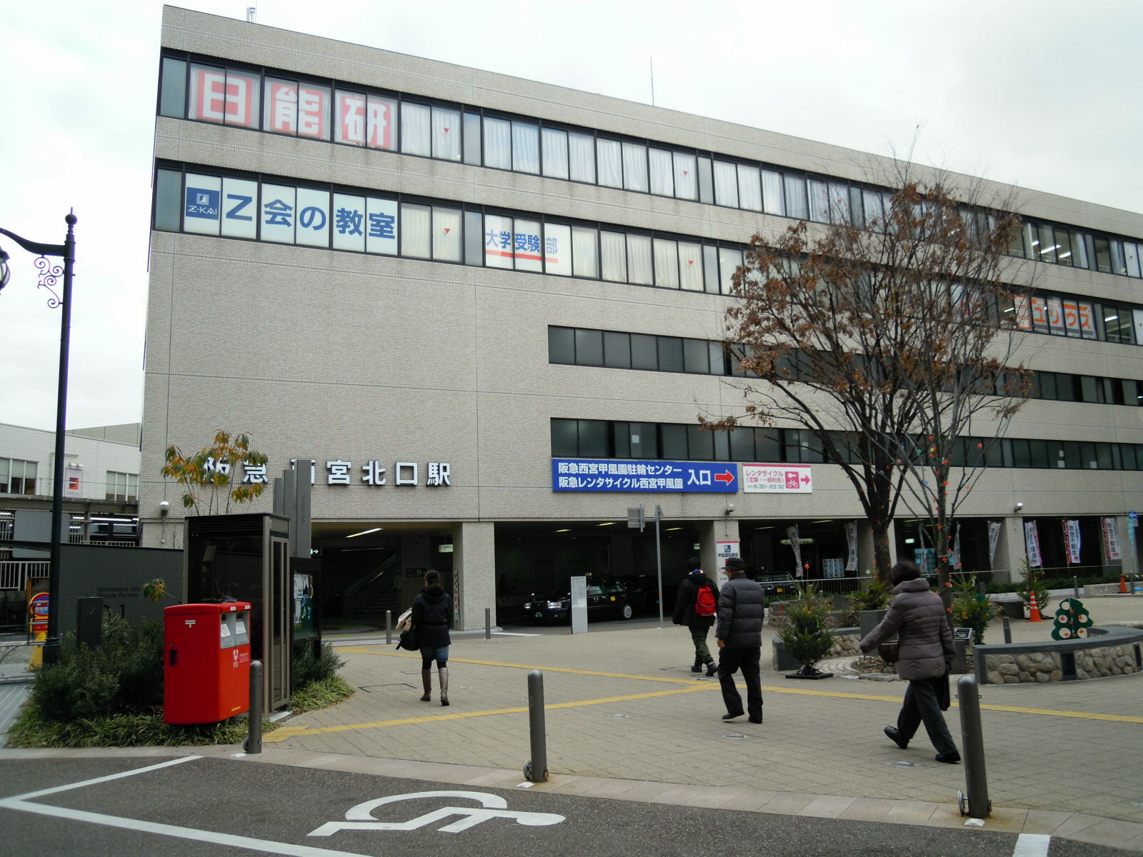 Hankyu Nishinomiyakitaguchi Station